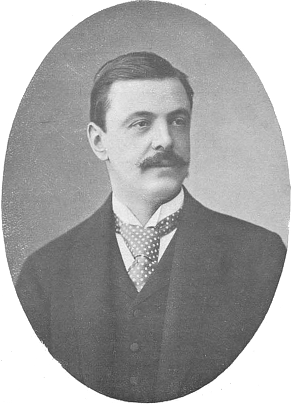 Князь Борис Александрович Васильчиков, член Государственного совета.